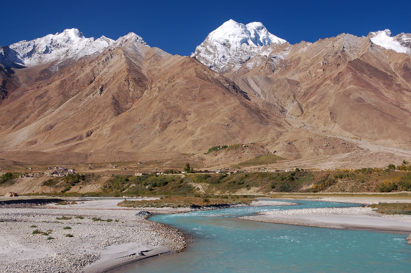 Zanskar Valley, Ladakh, India